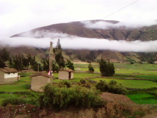 Paisaje del distrito de Ahuaycha en la Provincia de Tayacaja, Perú.